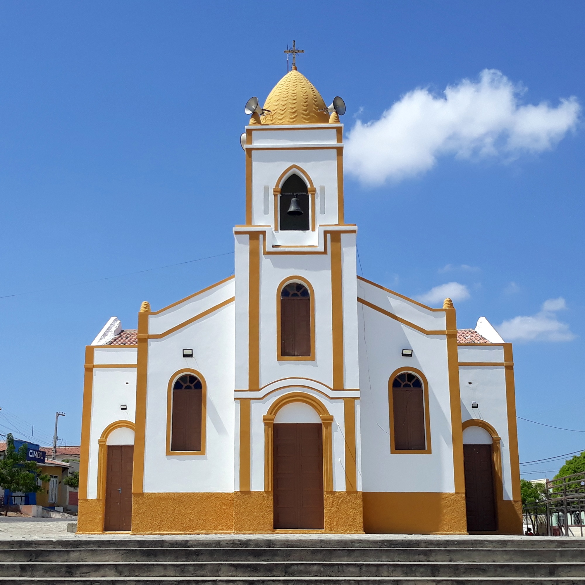 Capela de São Benedito, da paróquia de Nossa Senhora da Conceição, no bairro homônimo em Pau dos Ferros, no Rio Grande do Norte (Brasil)